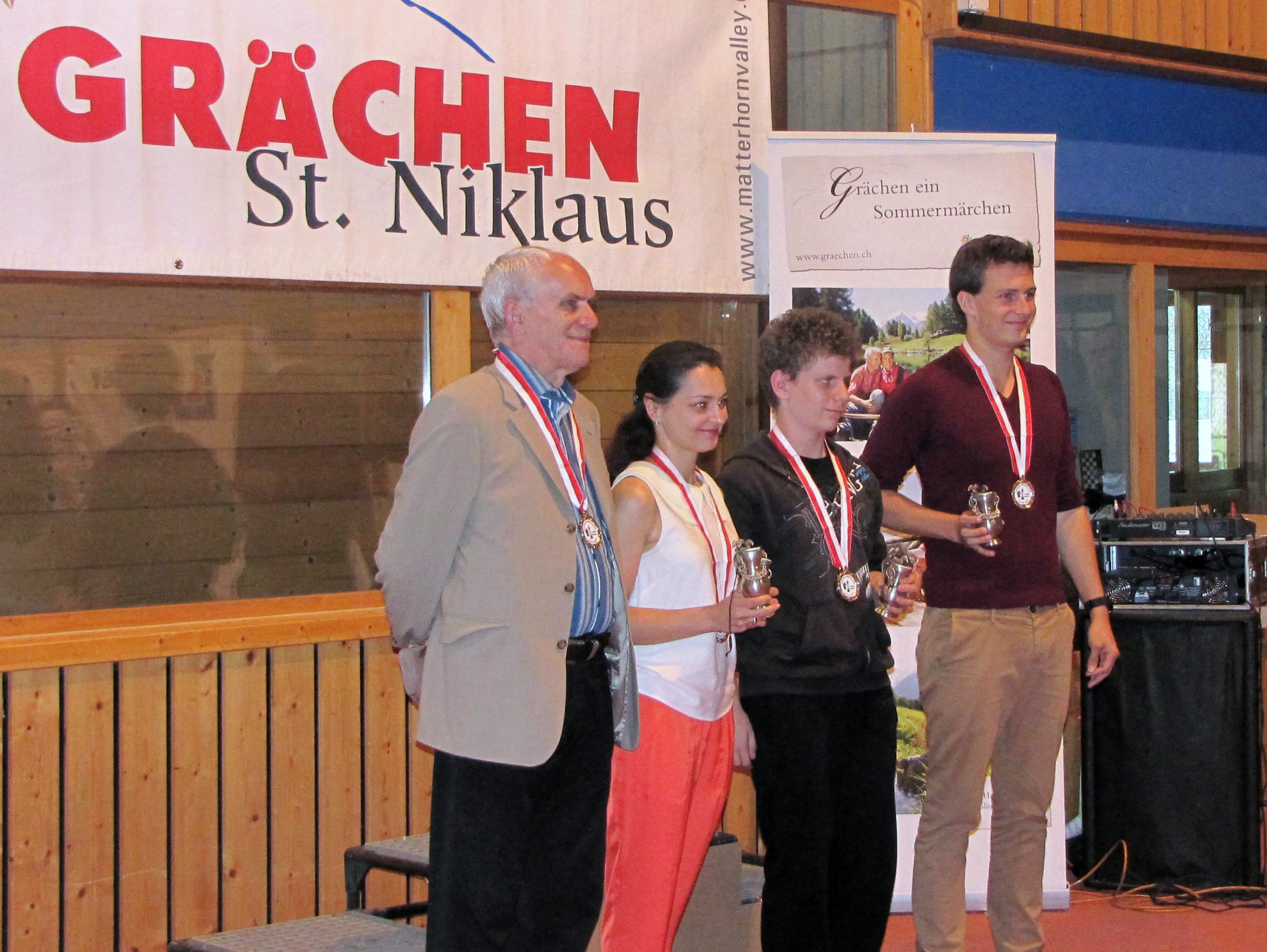 Die Schweizer Meister: Vjekoslav Vulevic (Senioren), Alexandra Kosteniuk (Herren), Aurélien Pomini (U16) und André Meylan (U18), Schweizer Schachmeisterschaft 2013 in Grächen.